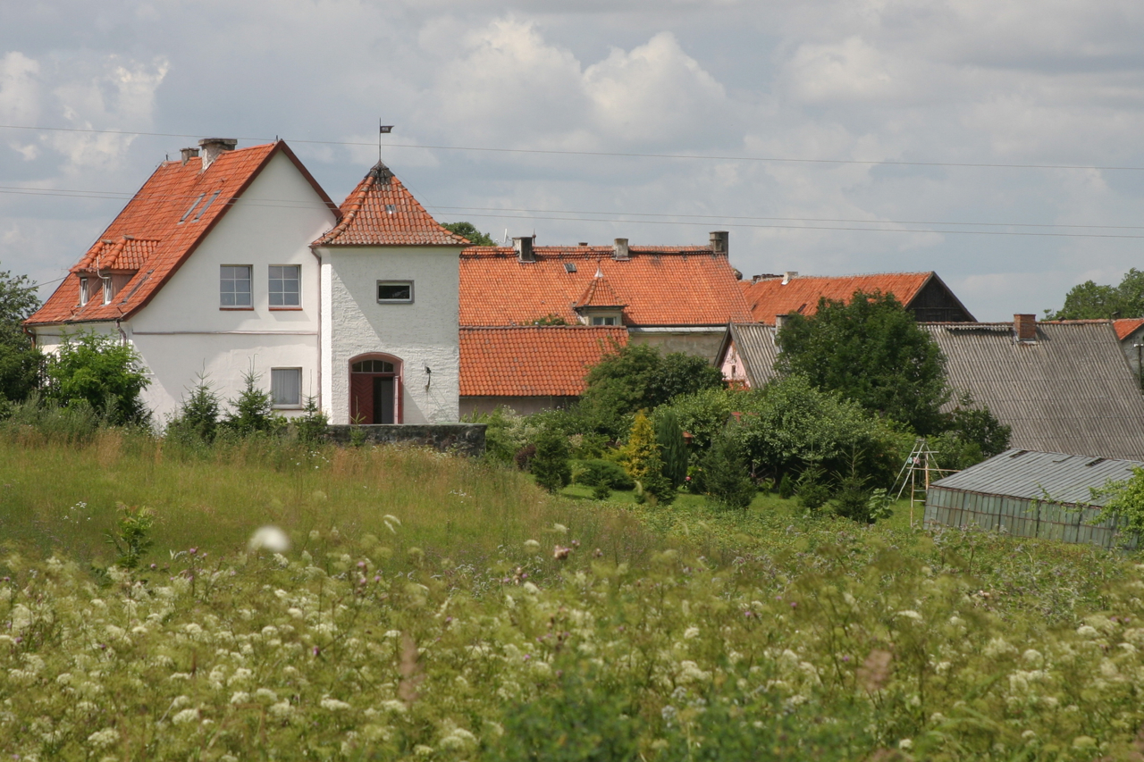 Skierki (deutsch Wehlack) ist ein Dorf in Polen in der Wojewodschaft Ermland-Masuren. Es gehört zur Gemeinde Barciany (Barten) im Powiat Kętrzyński (Rastenburg).